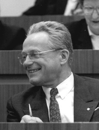 Title: Berlin, 11. Volkskammertagung People in the image: Gerlach, Manfred Dr.: Stellvertretender Staatsratsvorsitzender, Vorsitzender der Liberal-Demokratischen Partei Deutschlands (LDPD), DDR Factual corrections and alternative descriptions are encouraged separately from the original description. Additionally errors can be reported at this page to inform the Bundesarchiv. Original historic description: ADN-ZB Mittelstädt 13.11.1989 Berlin: Volkskammer-Tagung Die 11. Tagung der Volkskammer der DDR begann im Plenarsaal des Palastes der Republik. Gespannt verfolgen die Kandidaten für das Amt des Parlamentspräsidenten Dr. Günther Maleuda (1., DBD) und Prof. Dr. Manfred Gerlach (M., LDPD) die Auszählung der Stichwahl.